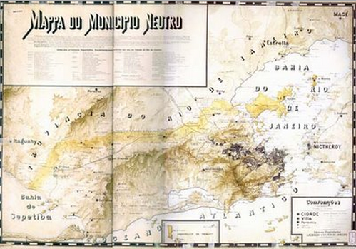 Mapa do Município Neutro, em 1880, Brasil.